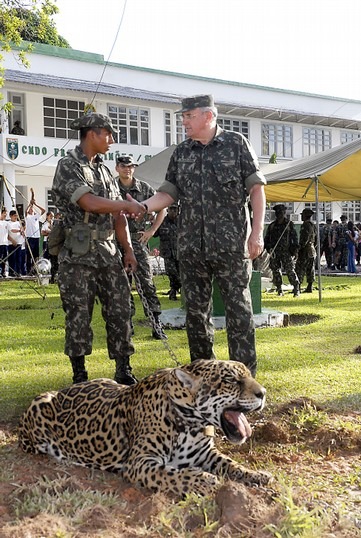 O ministro da Defesa, Nelson Jobim, ao lado da onça no batalhão de infantaria de selva em Tabatinga. Inspeção a postos de fronteira servirá como base para elaboração de plano estratégico de defesa nacional Foto: Antonio Cruz/ABr